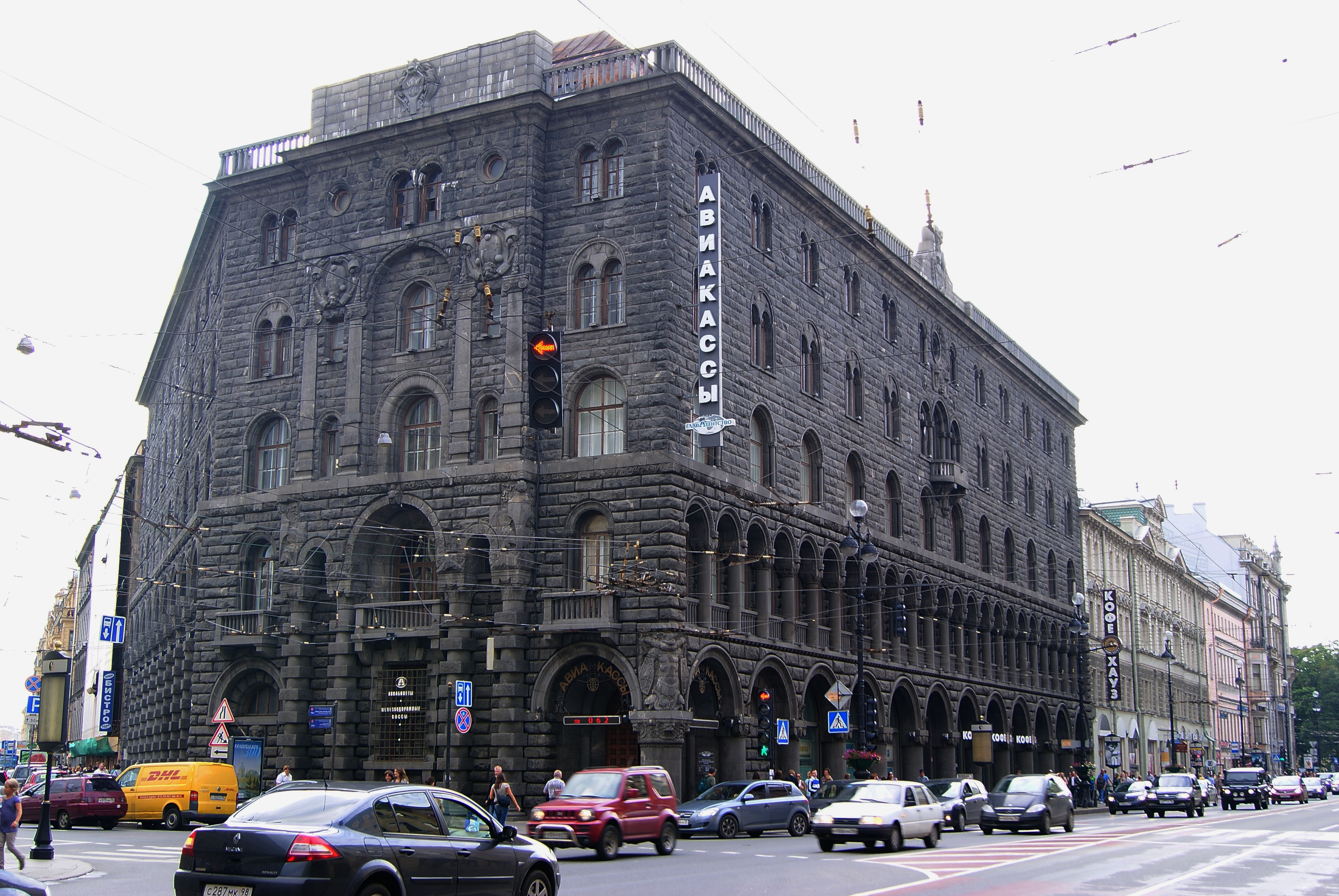 дом Вавельберга М. И. (Банк Санкт-Петербургский торговый)